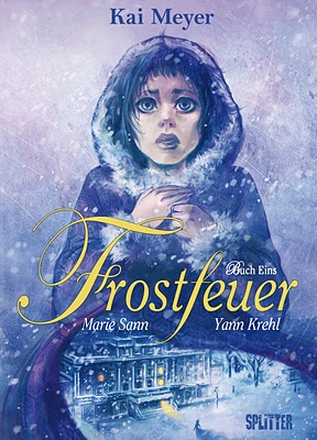 Cover des ersten Bandes vom Frostfeuer Comic von Marie Sann und Yann Krehl